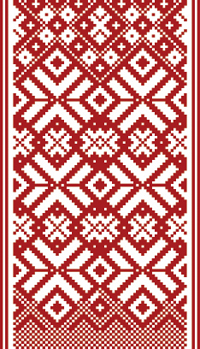 Элемент орнамента лиелвардского поясаLatviešu: Lielvārdes jostas ornamenta fragments